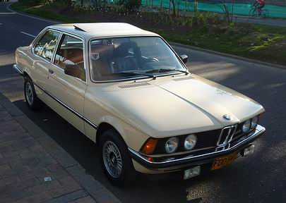 BMW E21